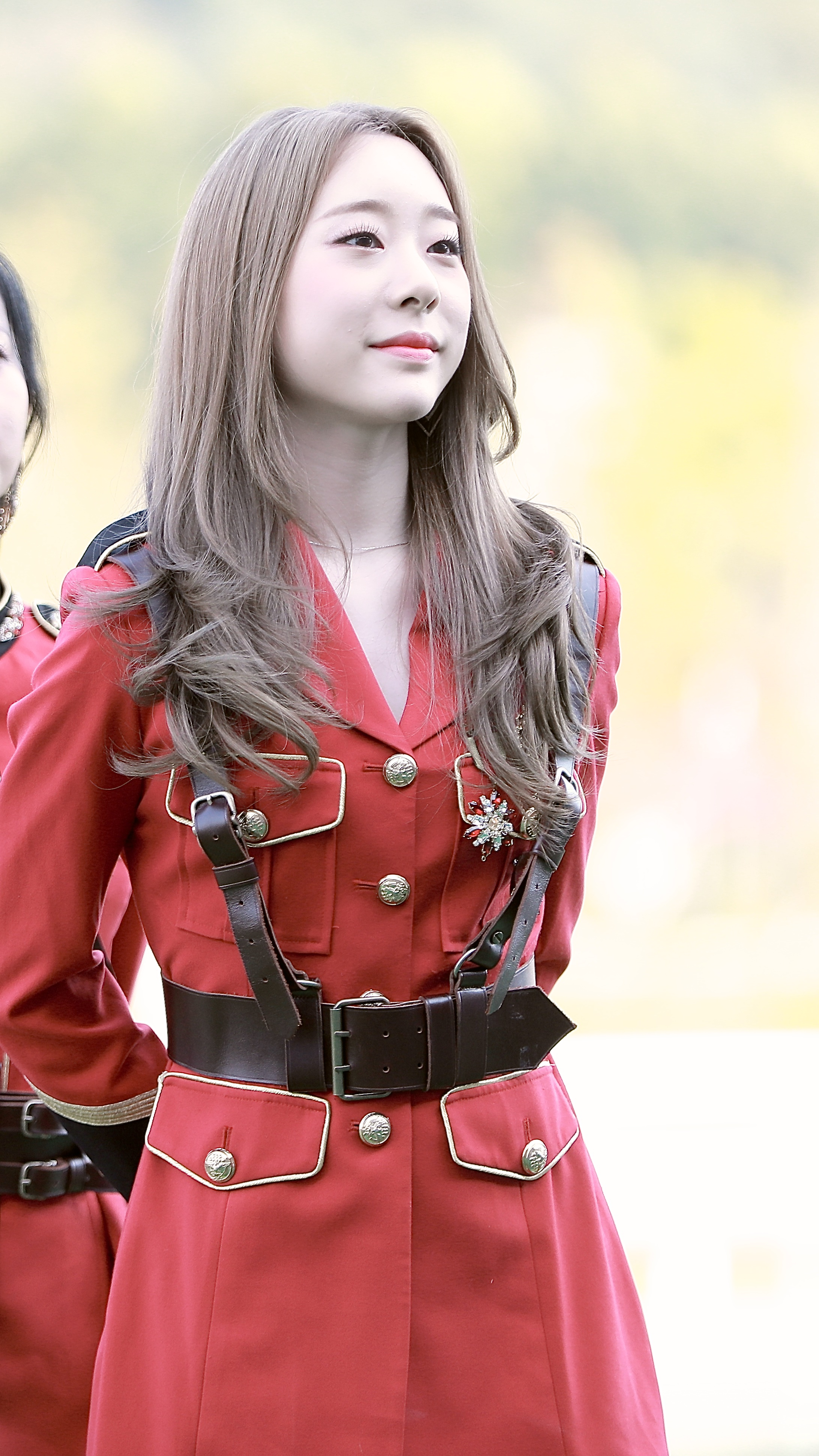 2018.09.09 우주소녀 '너에게 닿기를' '꿈꾸는 마음으로' - 렛츠런파크 코리안컵